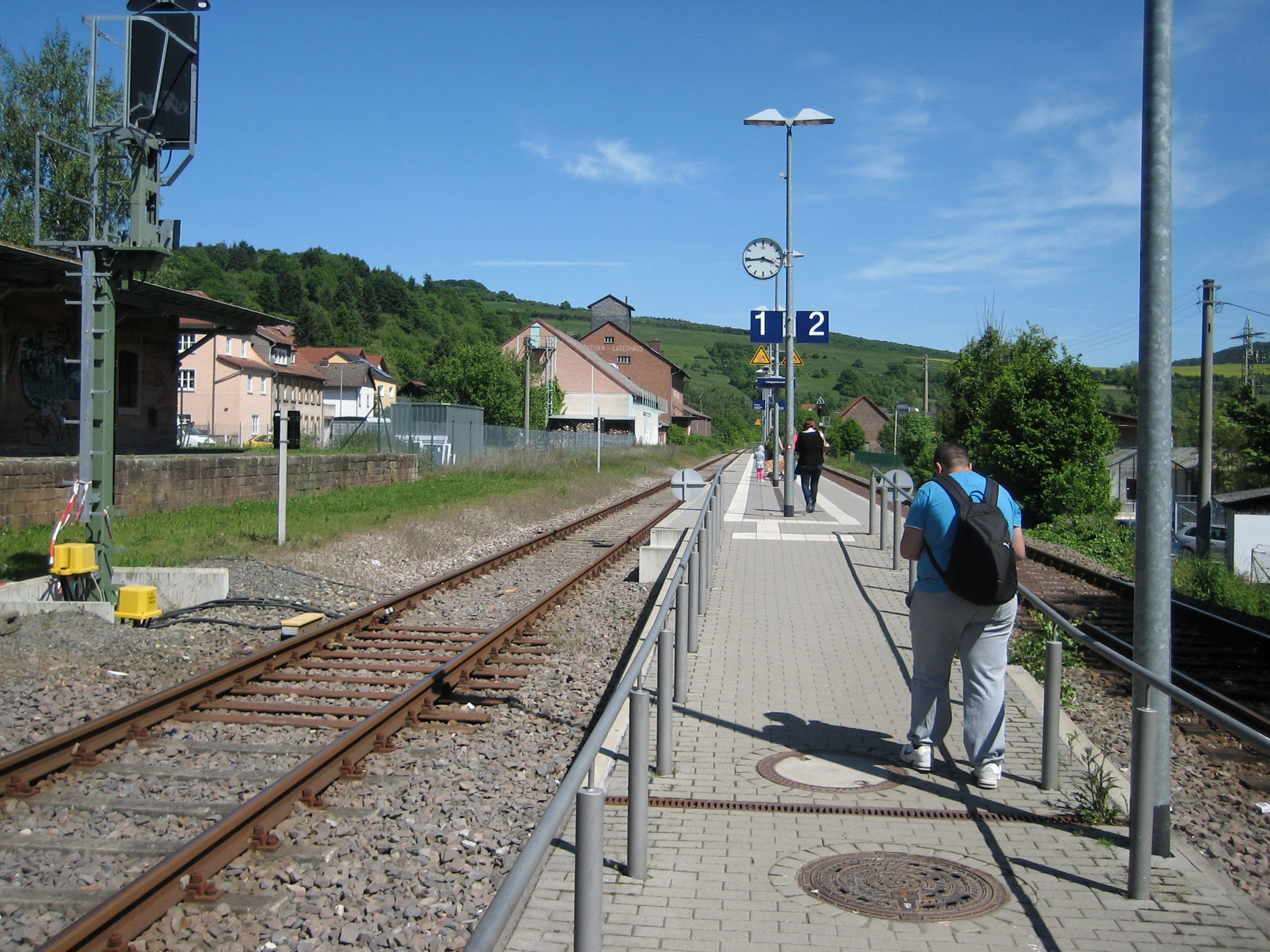 Bahnsteig des Bahnhof Wolfstein